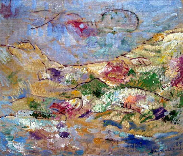 Landschaft, George Stefanescu, Öl/Leinwand auf Malpappe, 1985, Privat Sammlung Dipl.Ing.Arch.Radu Stefanescu-Gross, Bukarest, Rumänien.